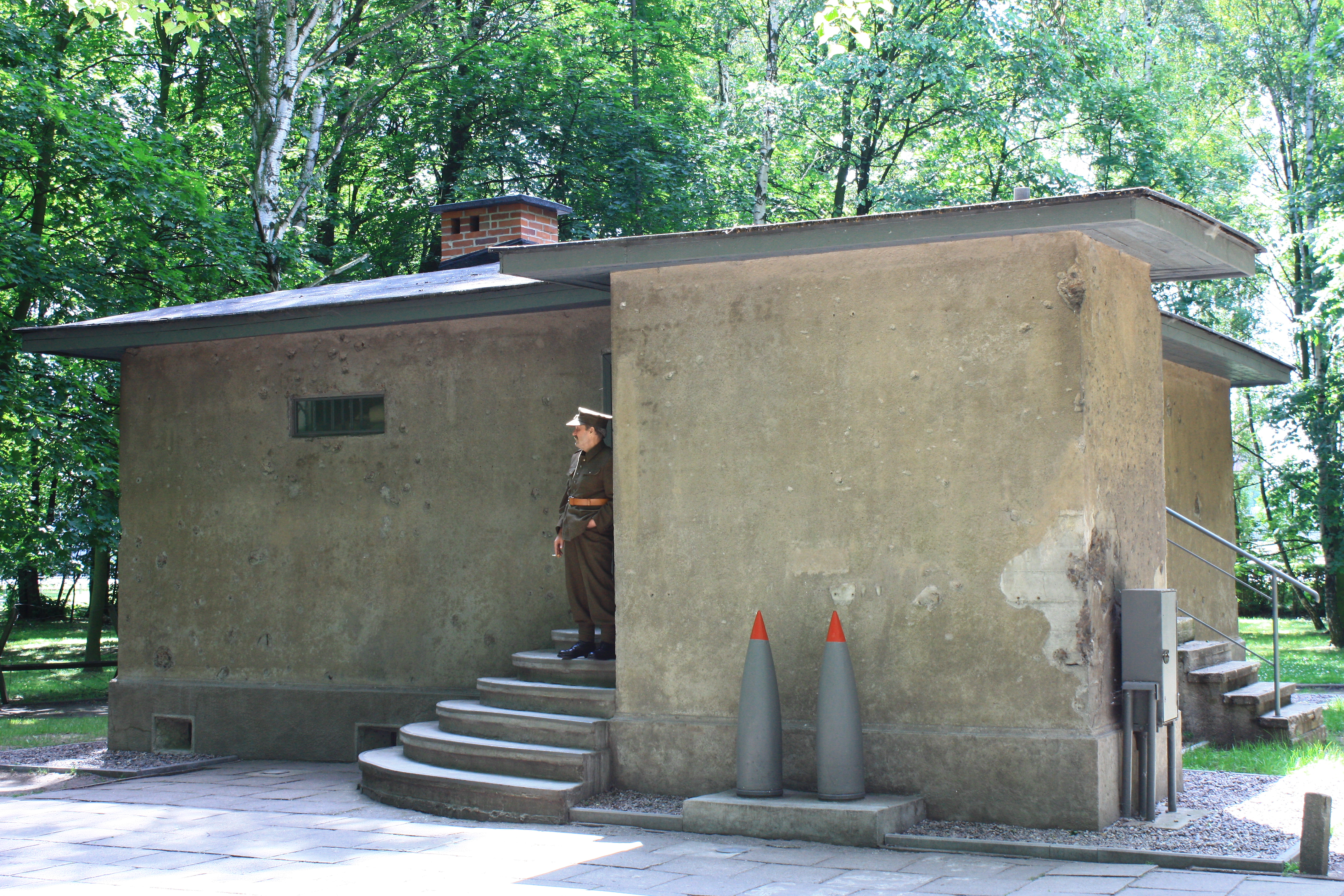 Gdańsk Westerplatte - Wartownia nr 1, 1925-1939